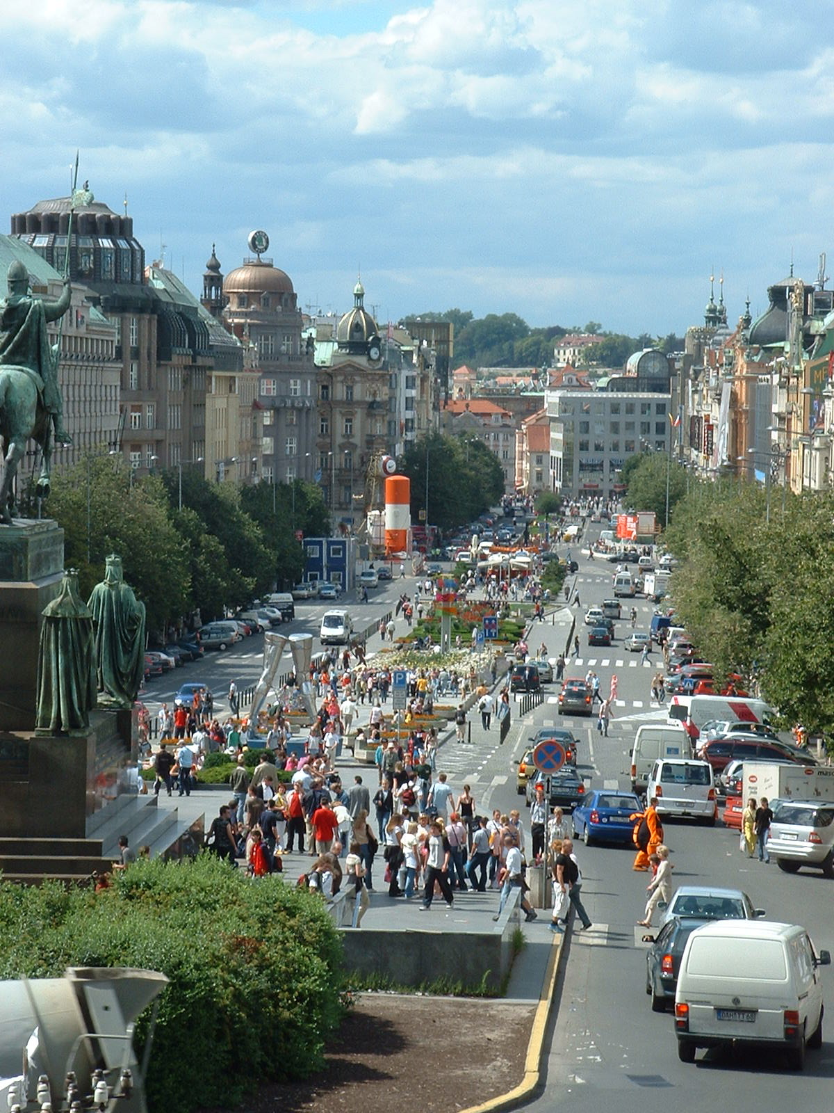 Prag, Wenzelsplatz